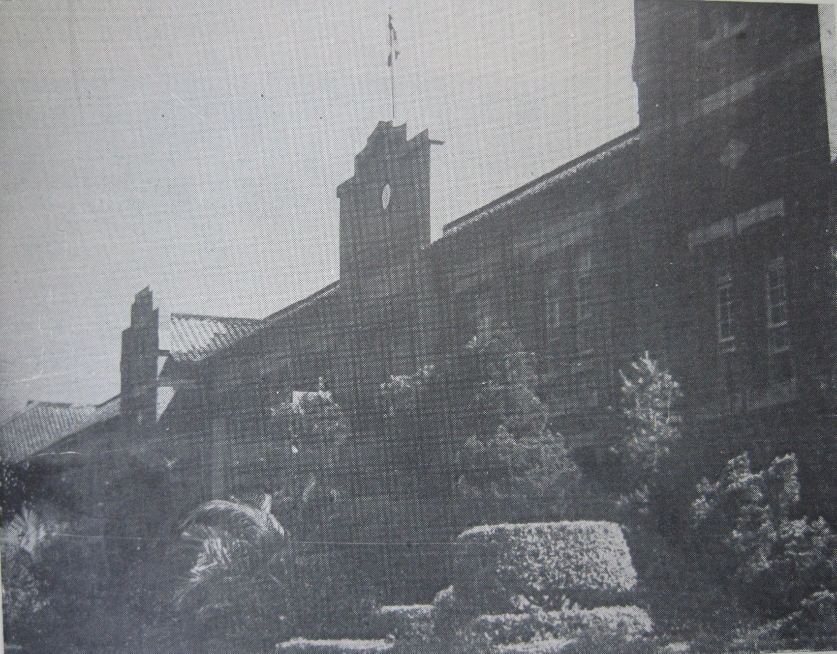 初代臺南市政府廳舍，今建興國中